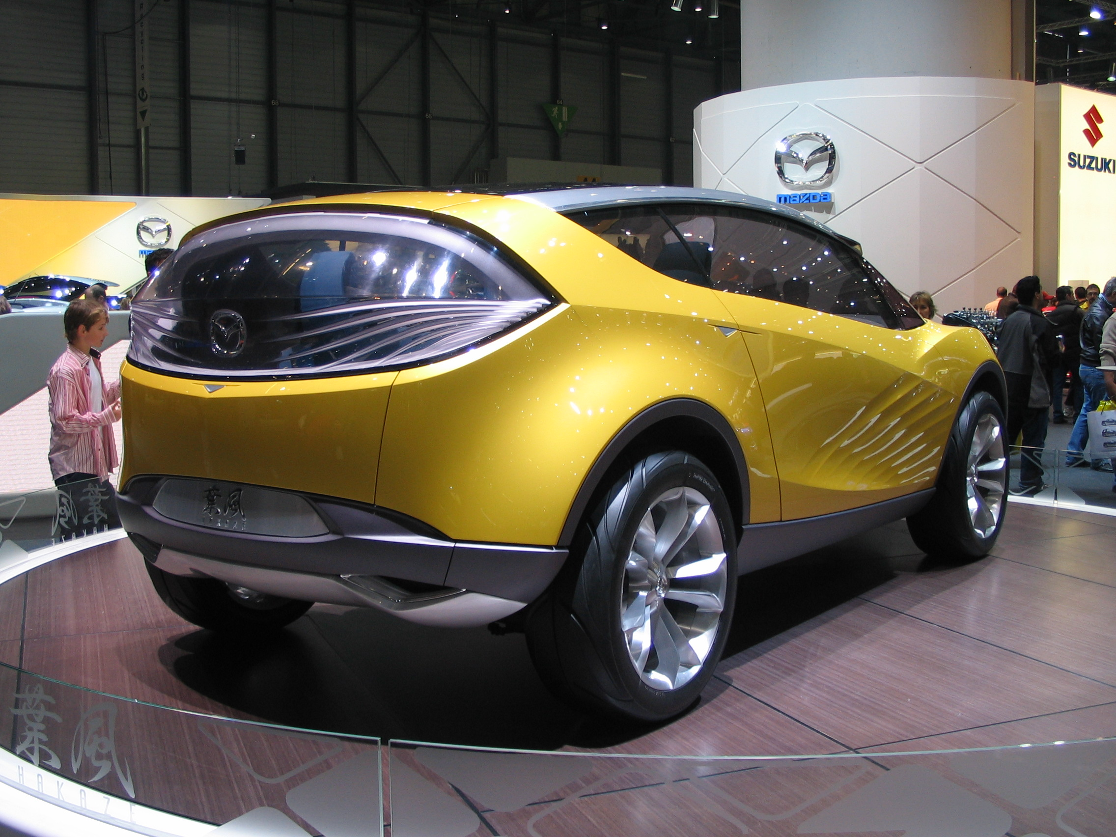 Concept-car Mazda Hakaze, salon de Genève 2007 -- interprétation de SUV compact.